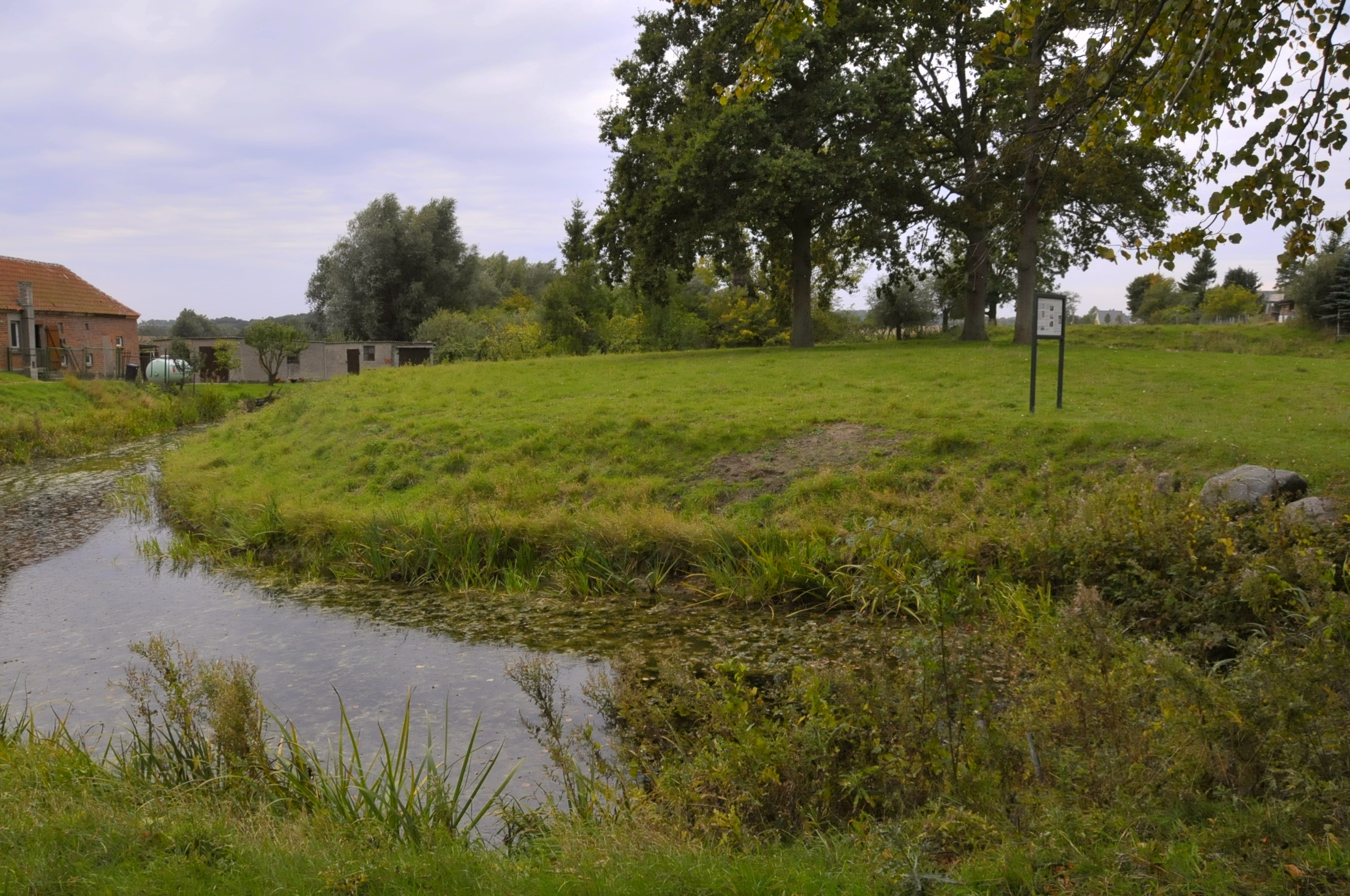 Arpshagen